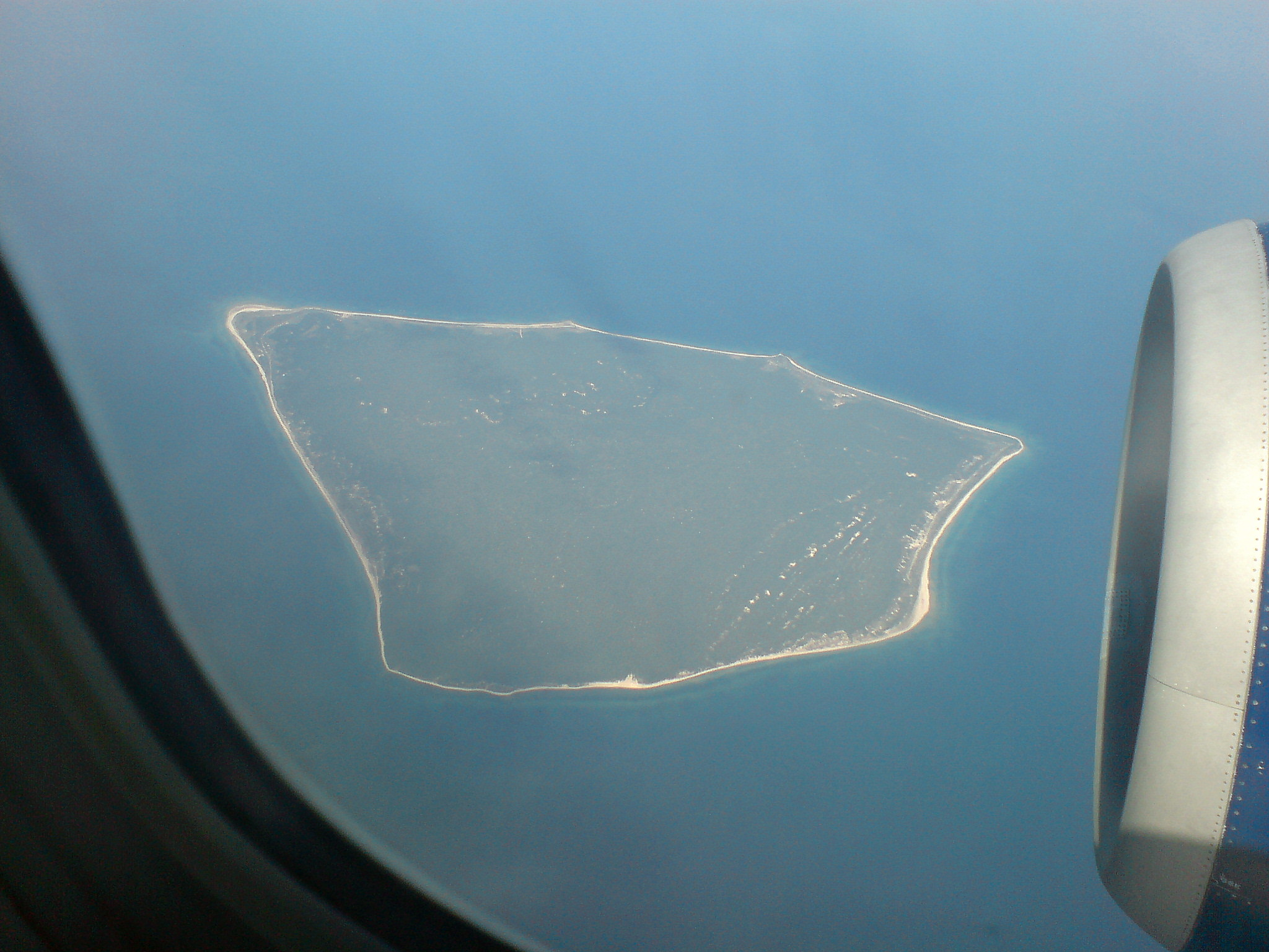 "Gotska sandön" seen from a Ryanair airplane flying from Riga to Stockholm Skavsta